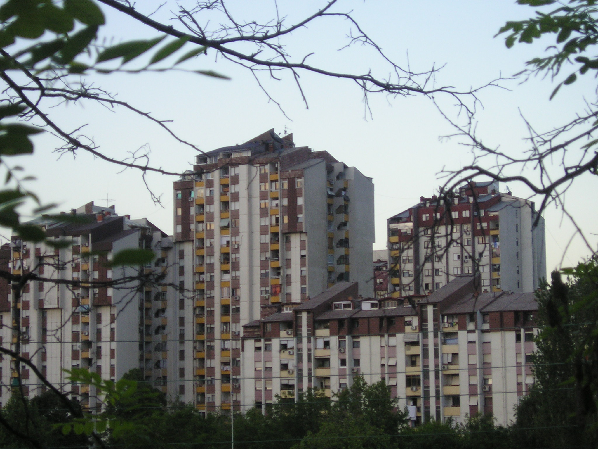 Станбениот комплекс во Капиштец на чие место веројатно било селото Долно Водно